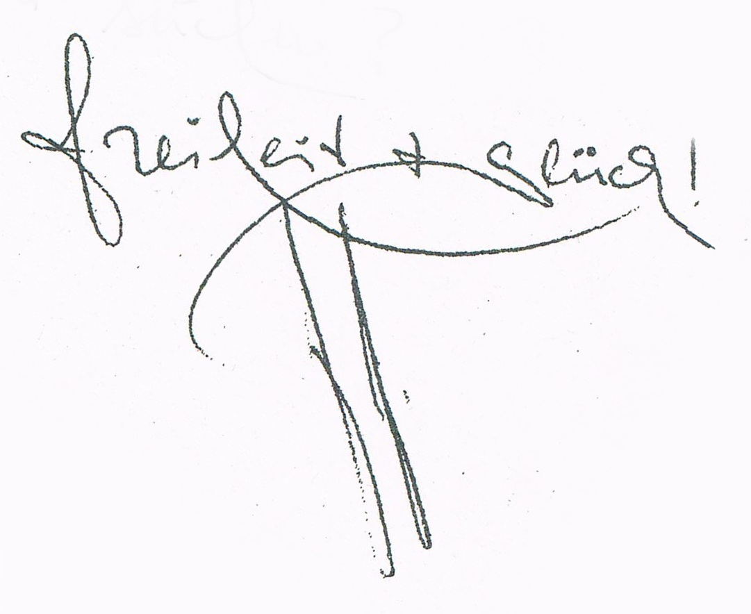 Unterschrift von Peter-Paul Zahl